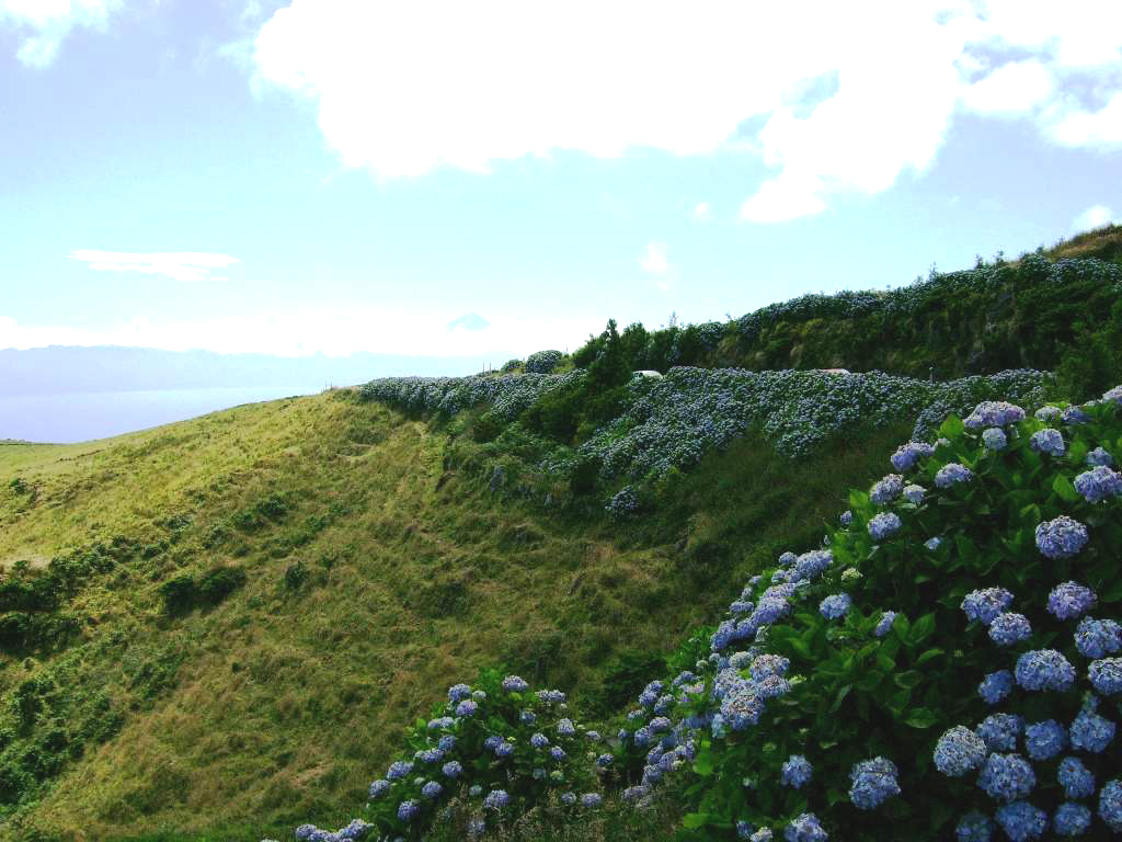 Paisagem da Serra do Topo com a ilha do Pico ao fundo, Topo, ilha de São Jorge, Açores, Portugal